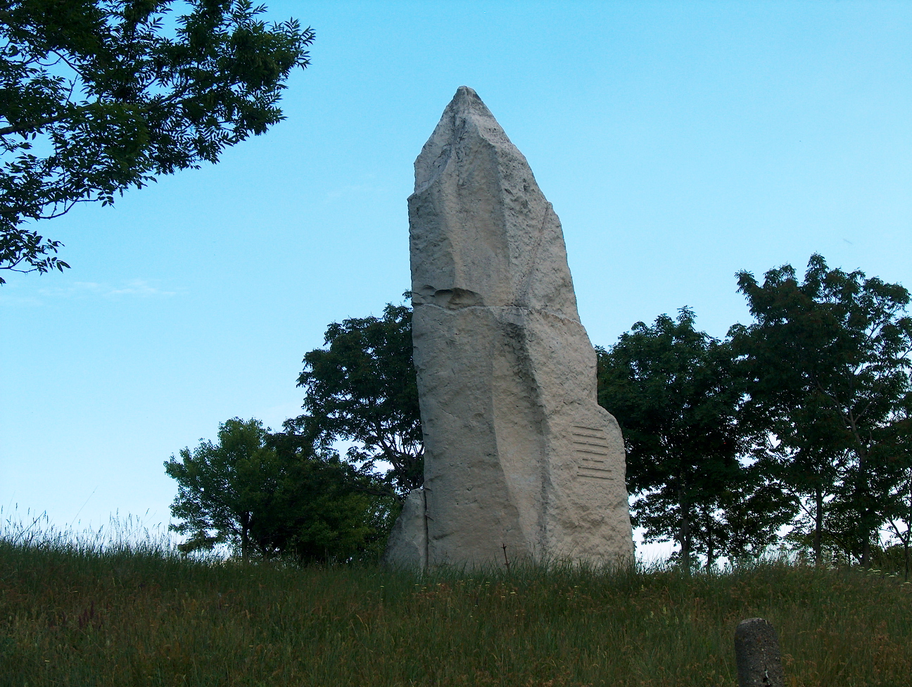 Паметник на войнишкото въстание над Черния кос